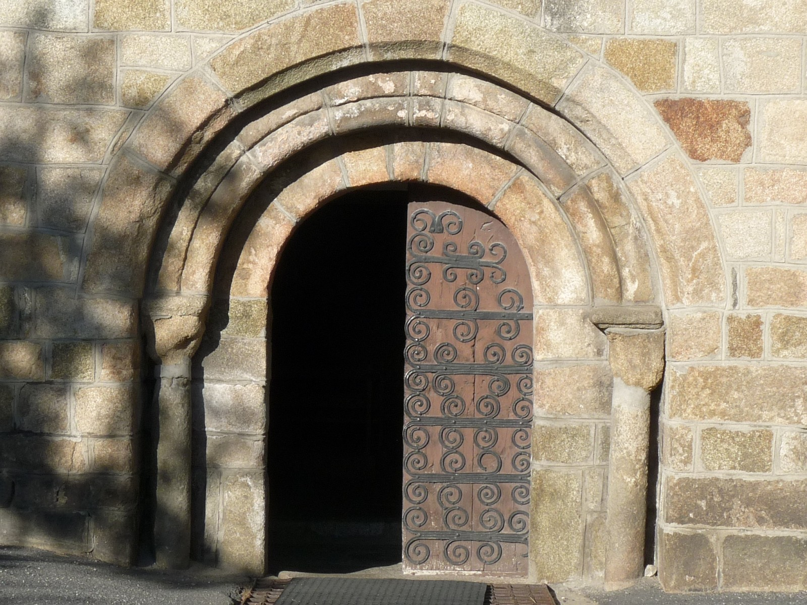 Portail de l'église d'Odeillo, Font-Romeu, Pyrénées-Orientales, France